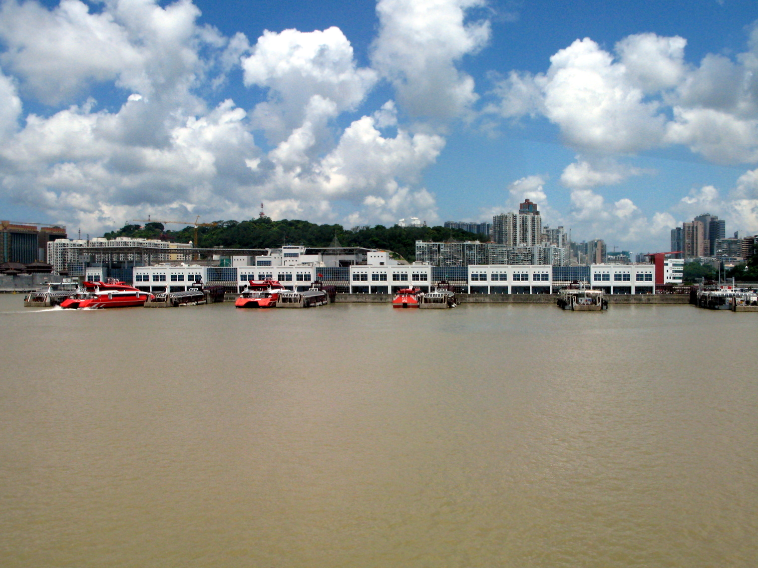 Terminal Marítimo do Porto Exterior 外港碼頭